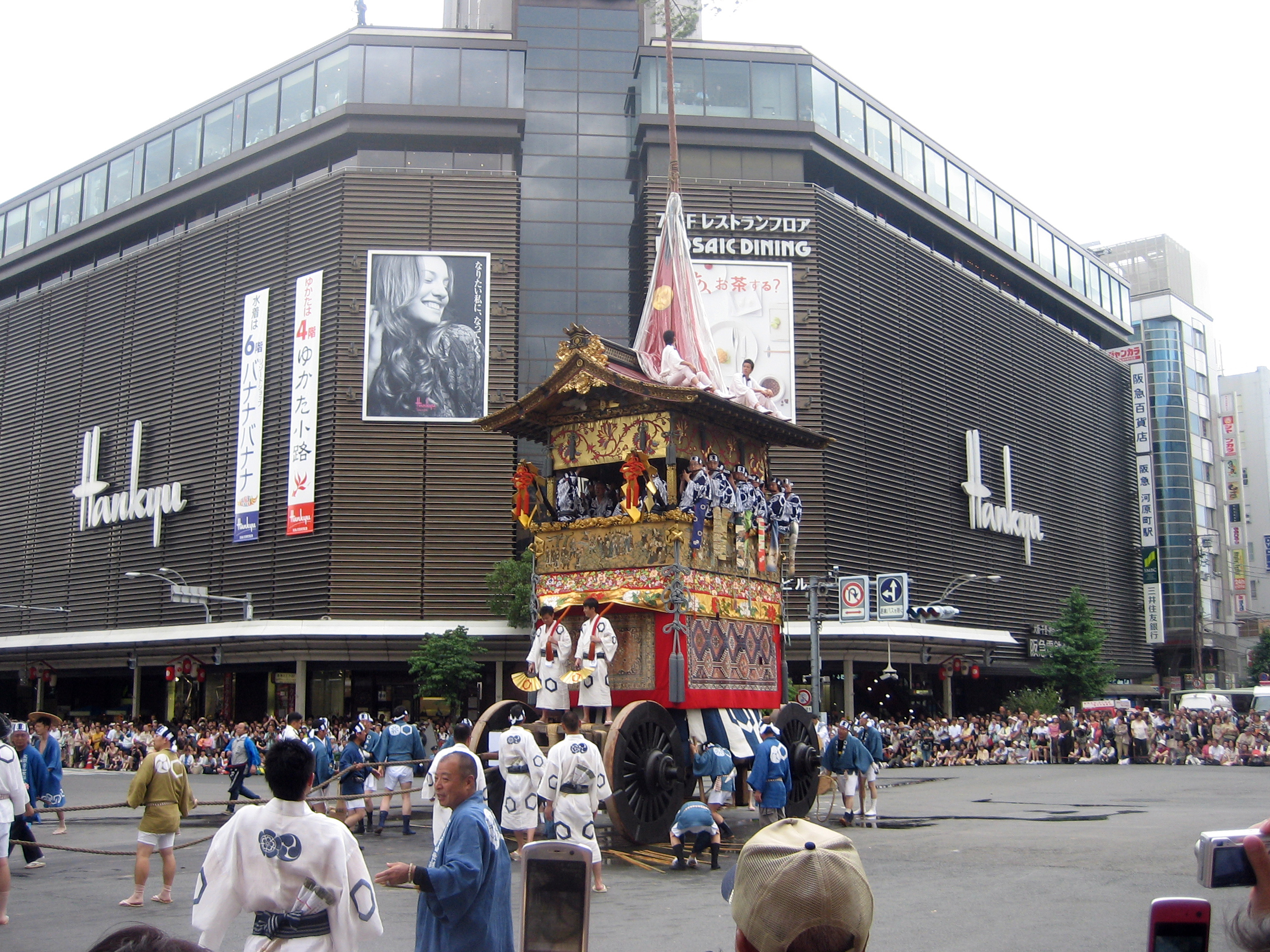 2009年7月17日に京都市で行なわれた祇園祭山鉾巡行の様子。 方向転換が完了した北観音山。